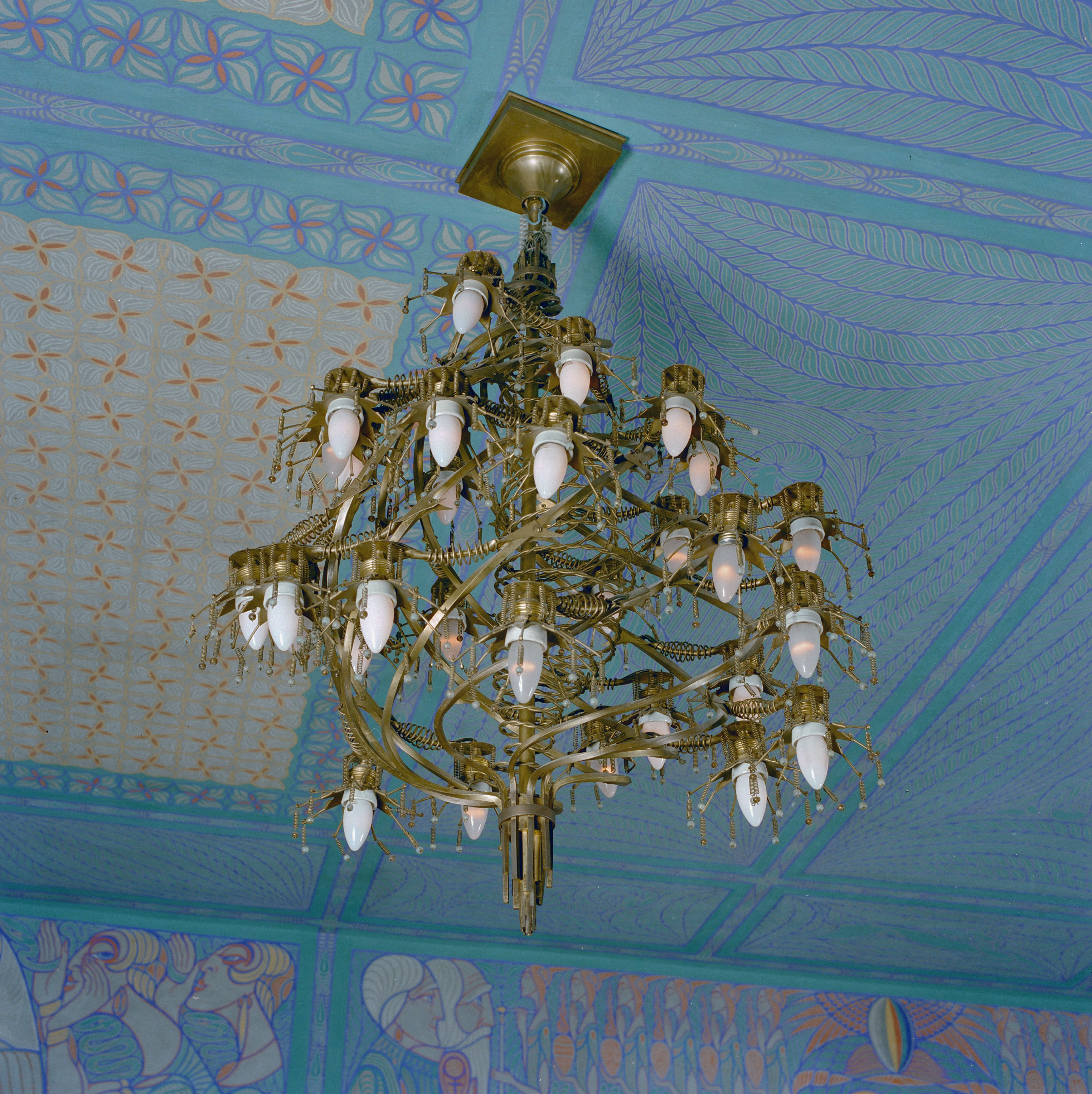 Voormalig Raadhuis: Interieur eerste verdieping, trouwkamer eerste klasse, plafondlamp van Jan Eisenloeffel